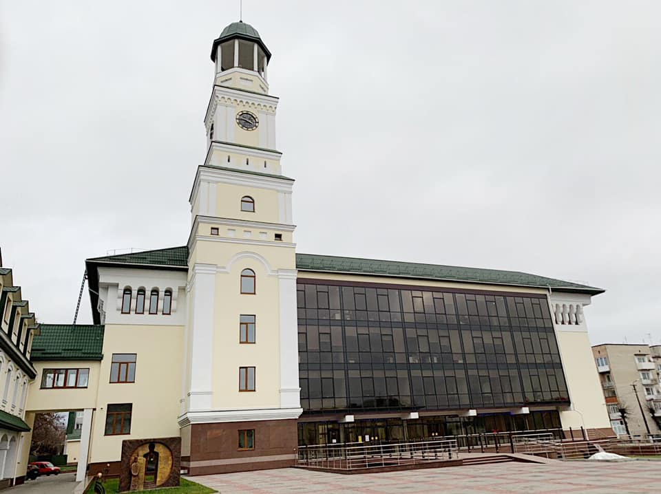 Новий корпус Острозької академії